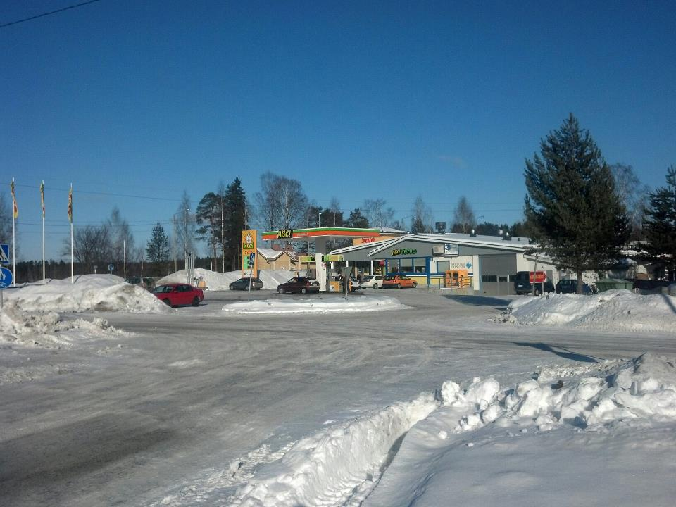 Tervon kunnan ABC, joka on oikeastaan Tervon nk. sydän.